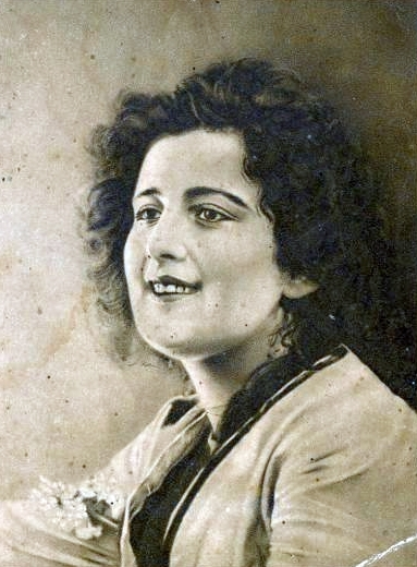 Ната Вачнадзе